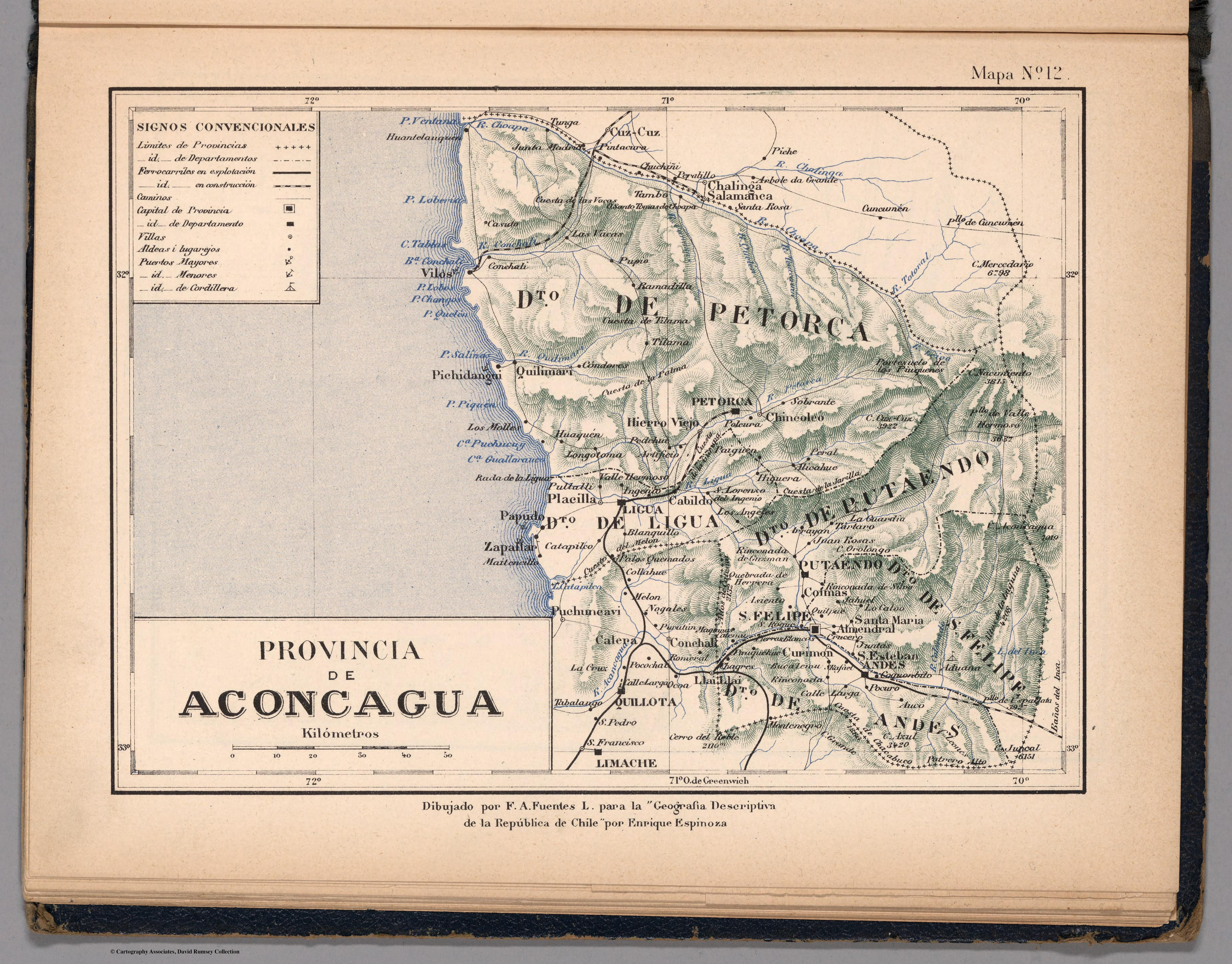 Atlas de Chile Arreglado para la Jeografia Descriptiva de la Republica de Chile por Enrique Espinoza.